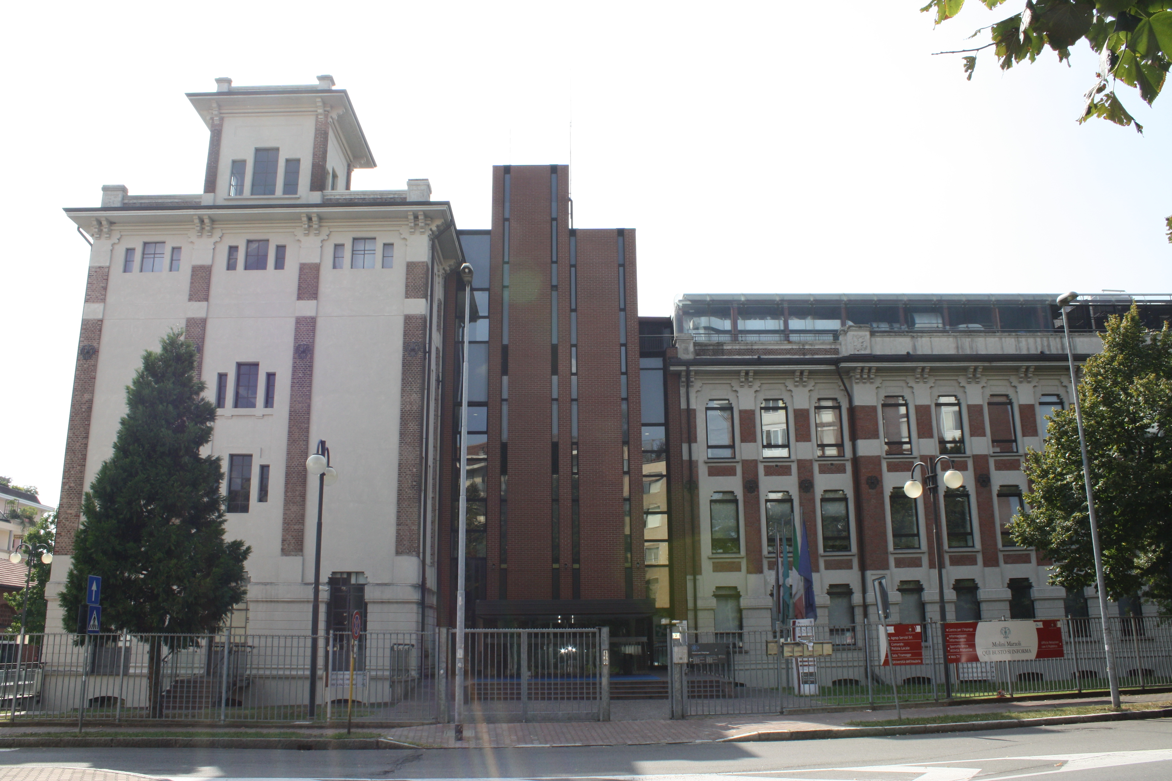 Facciata dell'edificio principale dei Molini Marzoli Massari di Busto Arsizio (VA).